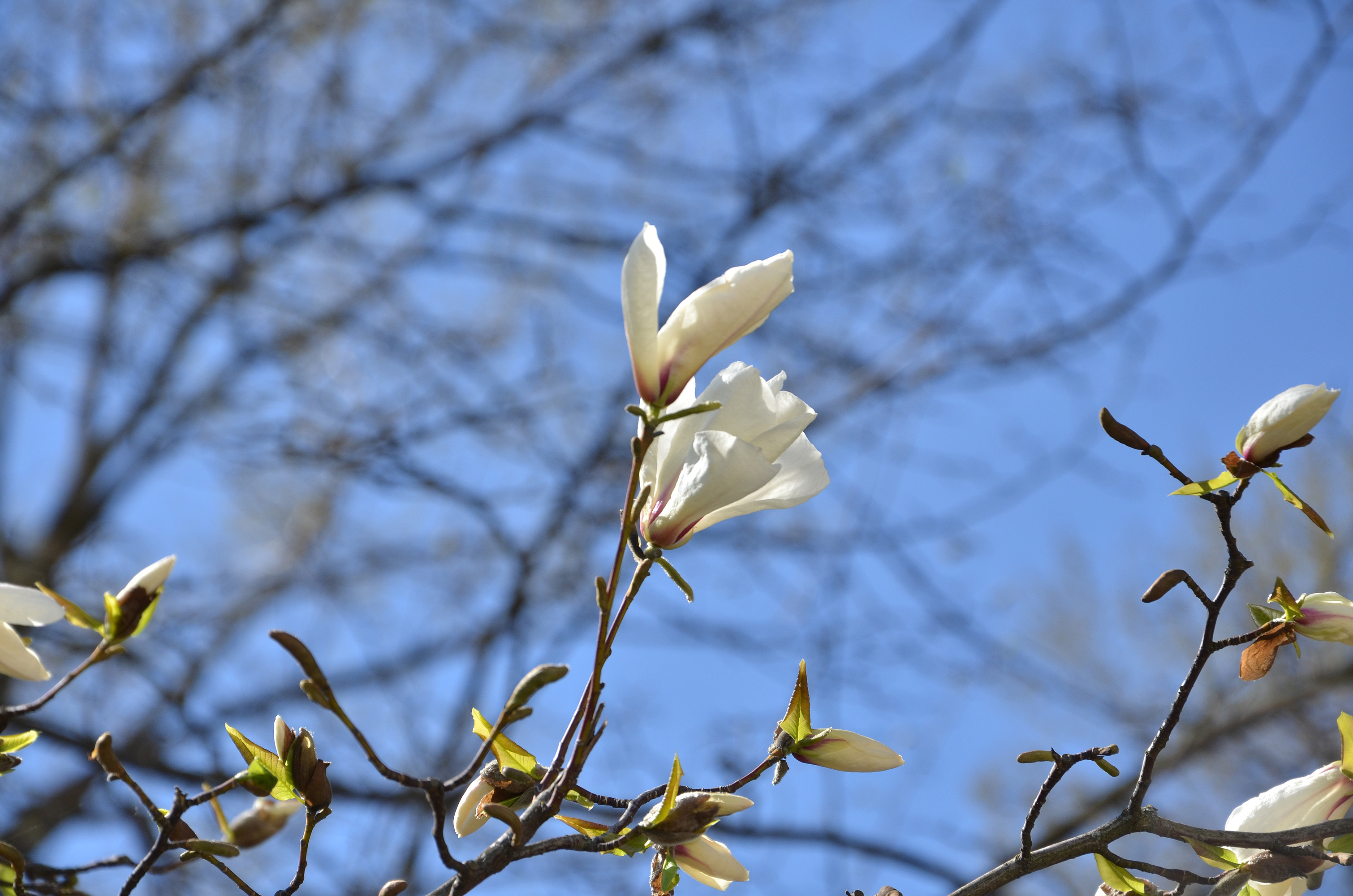 Весняний цвіт «Тернопільських магнолій».